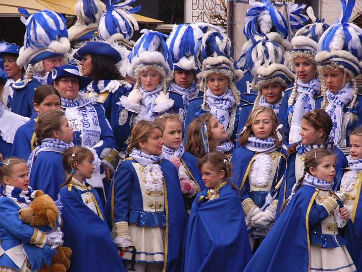 Erkelenzer Karnevalsgarde am 11.11. beim Hoppeditz-Erwachen auf dem Marktplatz